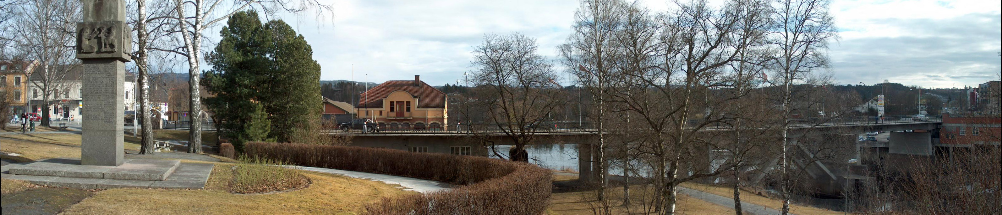 Hønefos bru (sett fra Nordre park)